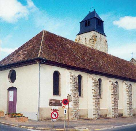 église de saint-clément